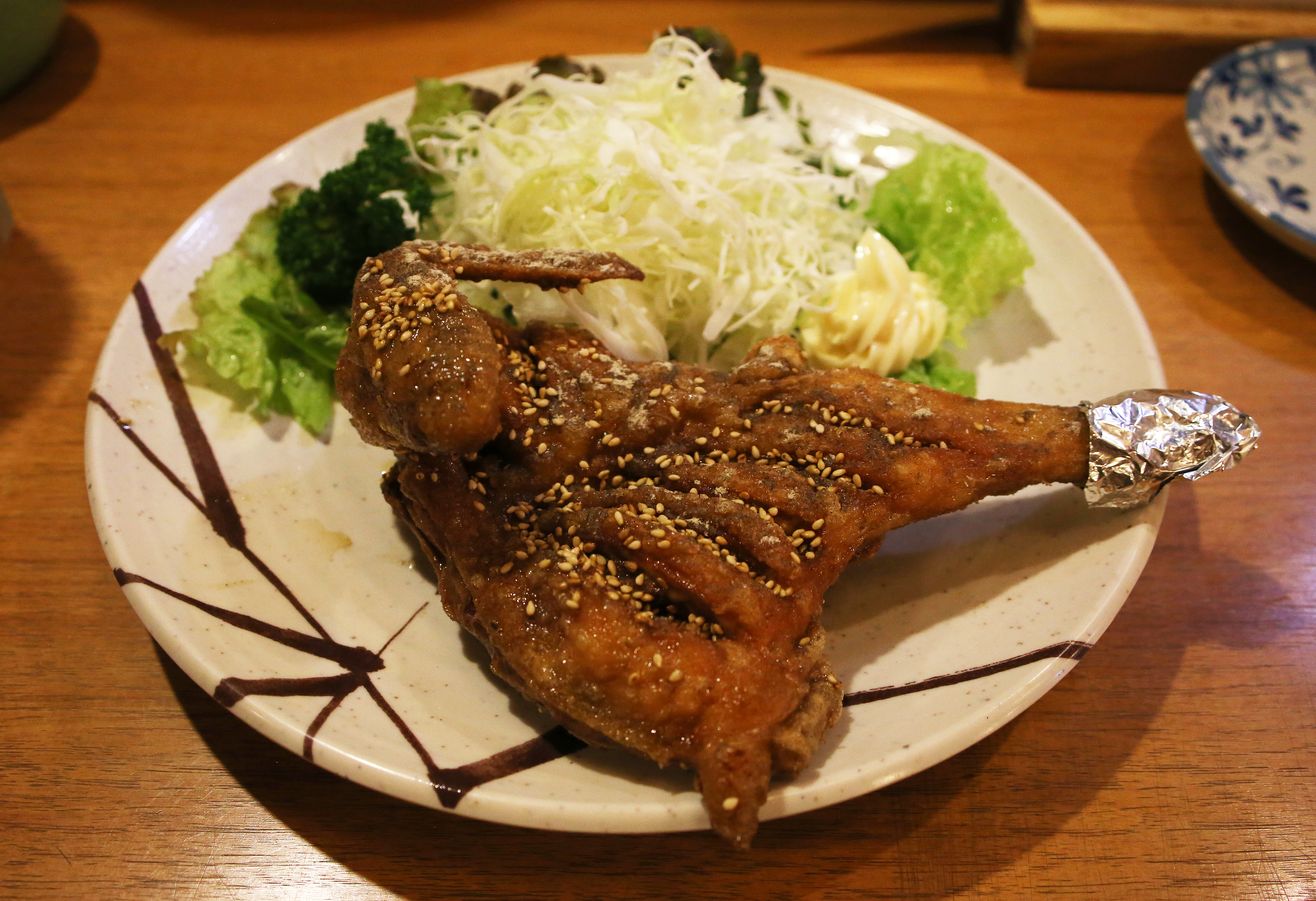 風来坊において提供されるターザン揚げ。画像処理済。